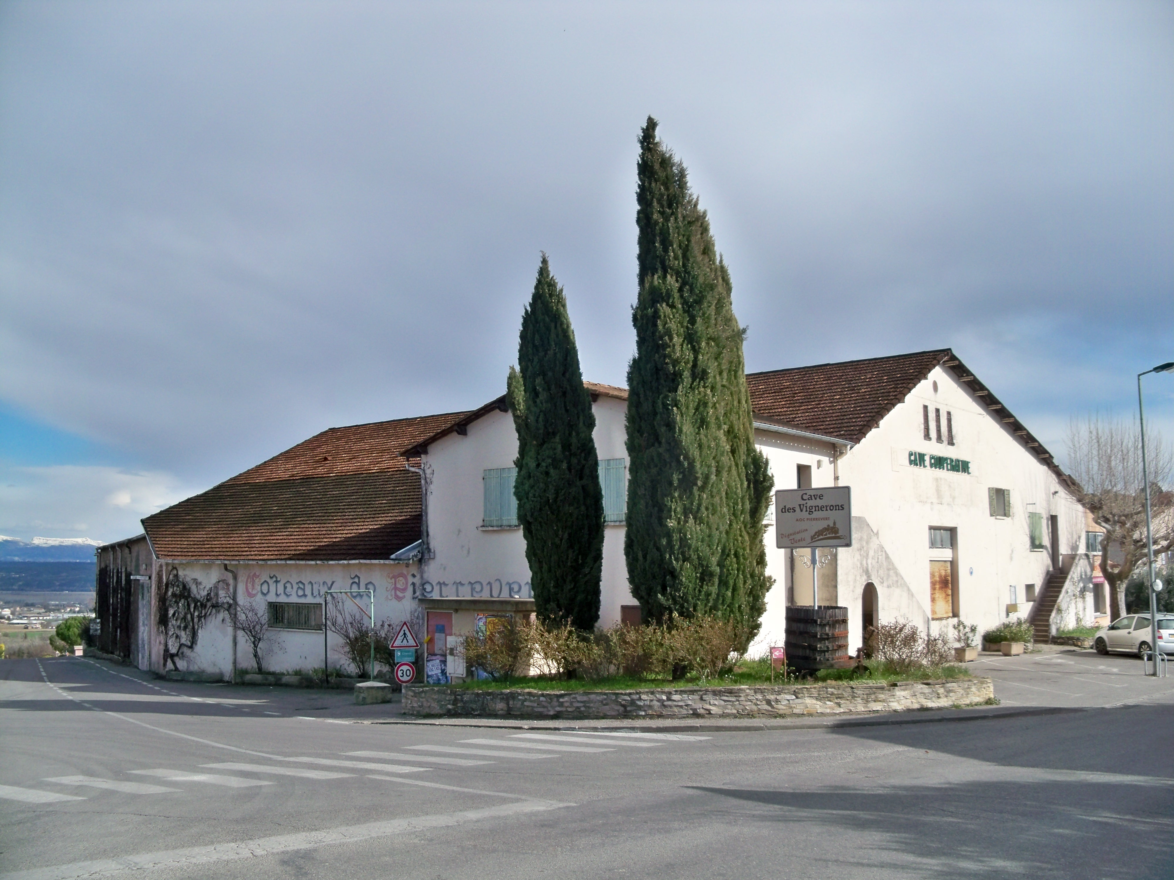 Coopérative vinicole à Pierrevert